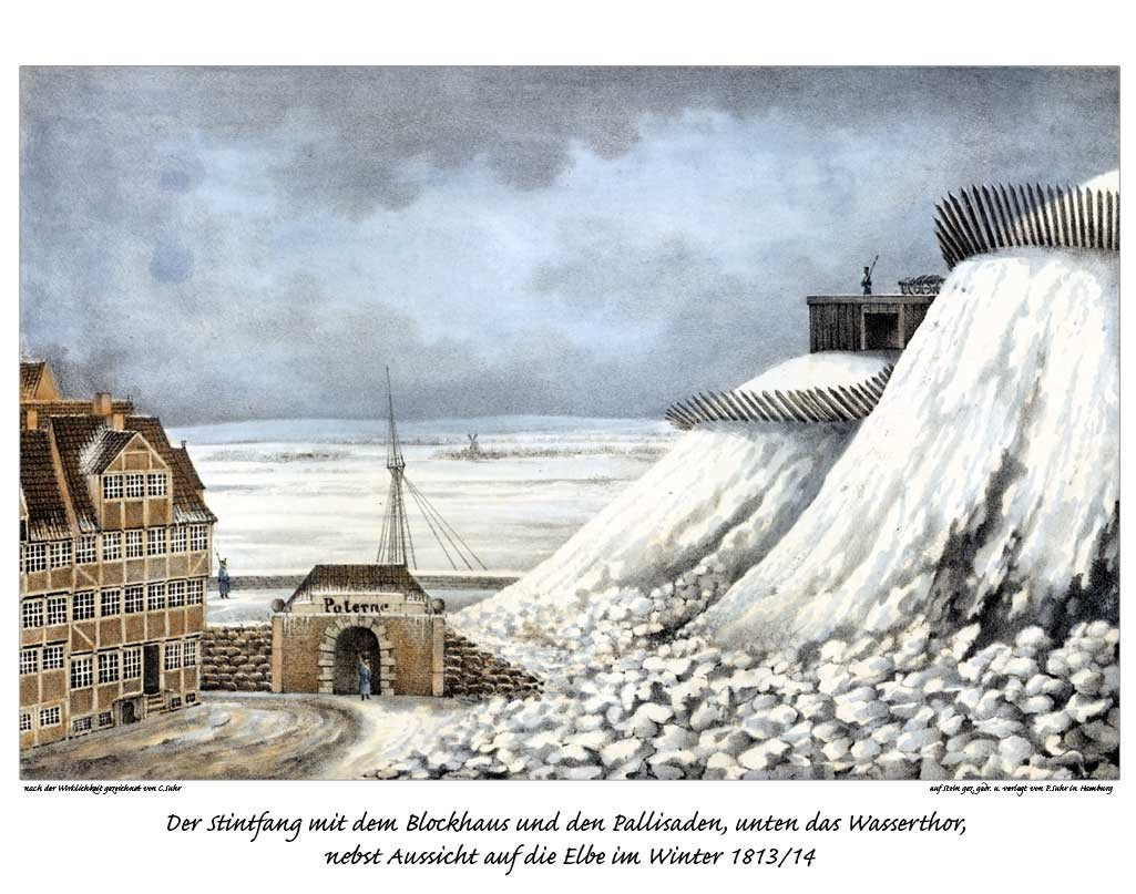 Der Stintfang mit dem Blockhaus und den Pallisaden, unten das Wasserthor, nebst Aussicht auf die Elbe im Winter 1813/14, Zeichnung von C. Suhr, Lithogr. von P. Suhr